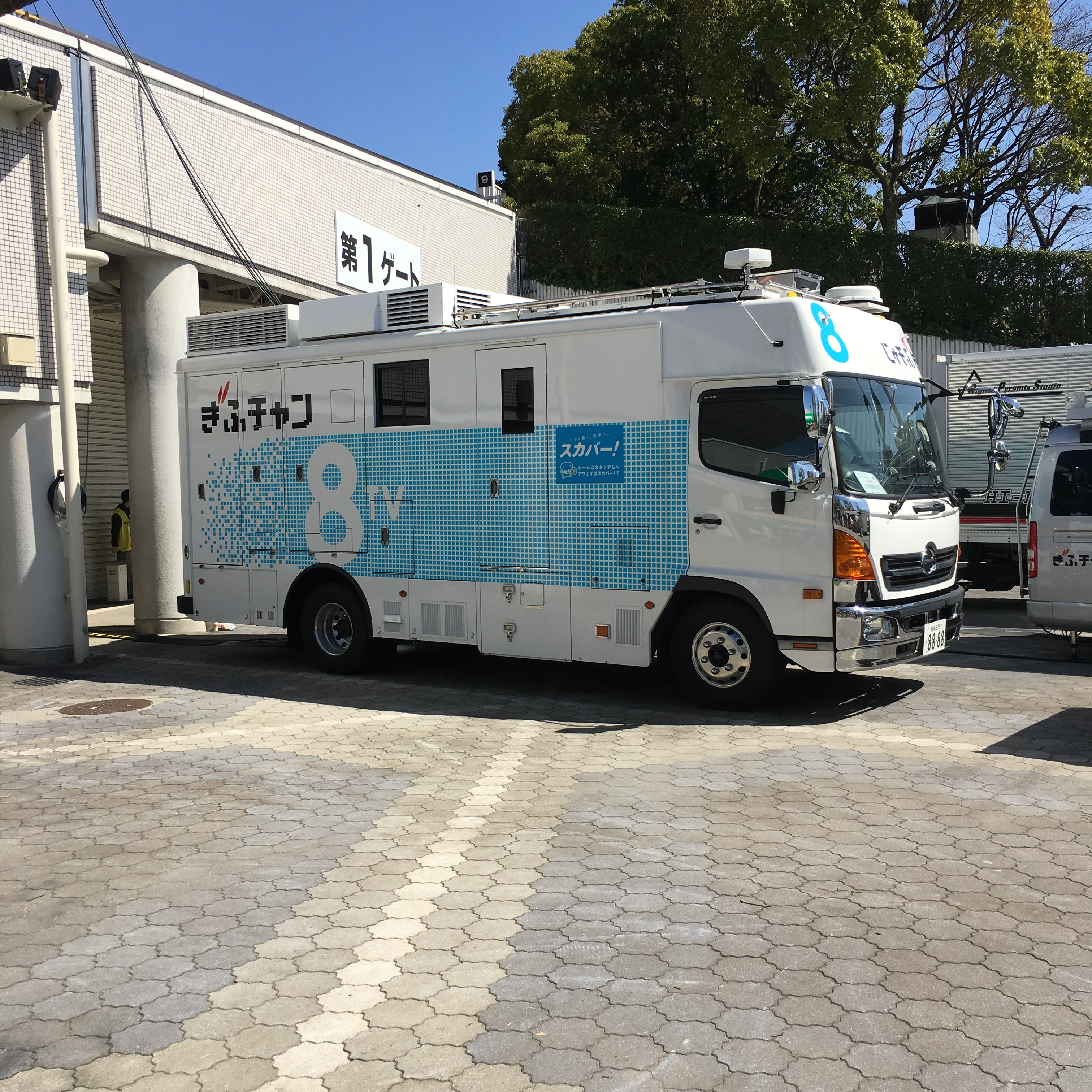 日野・レンジャー 岐阜メモリアルセンター長良川球戯場にて本人撮影。